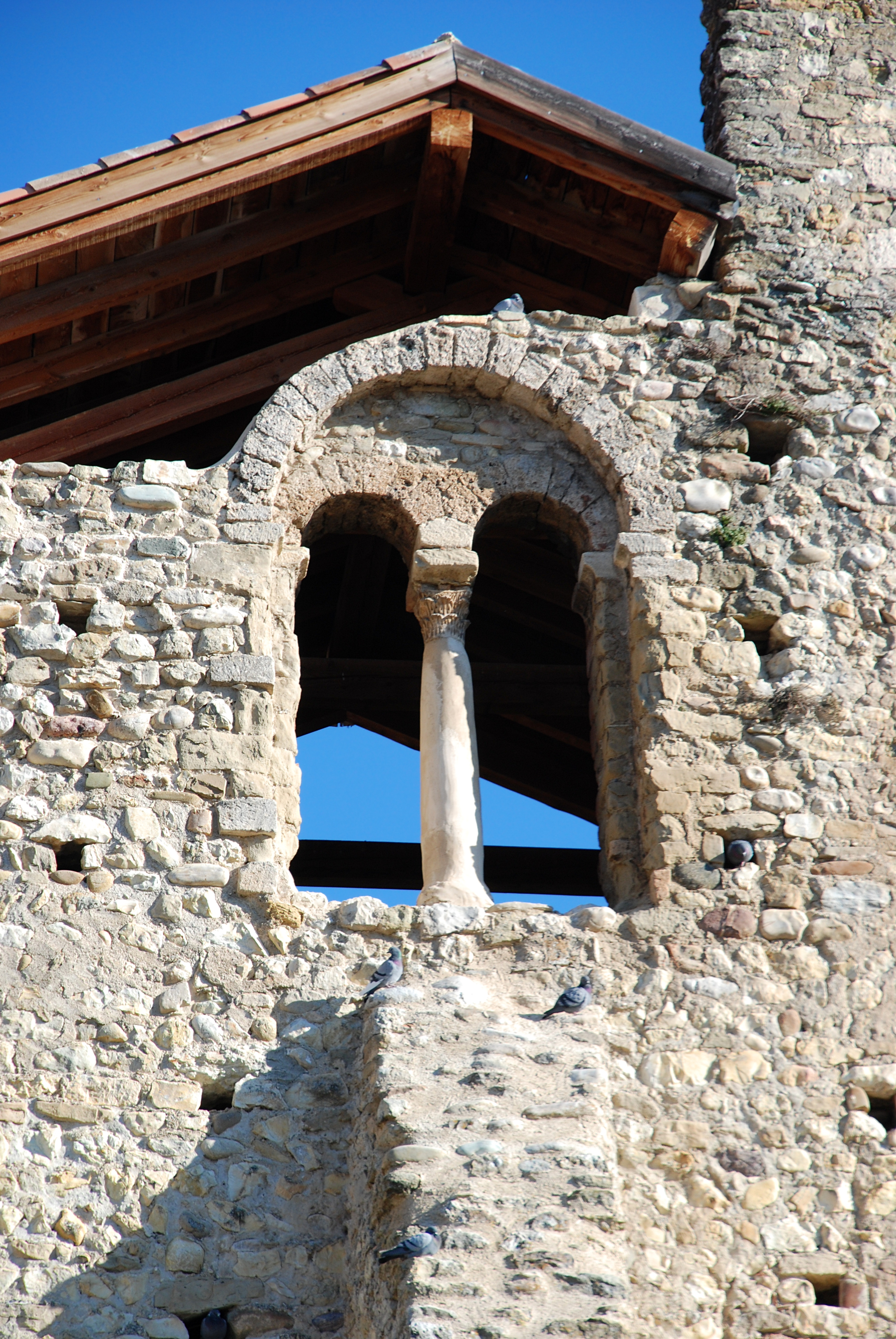 France - Provence - Église Saint-Martin de Volonne